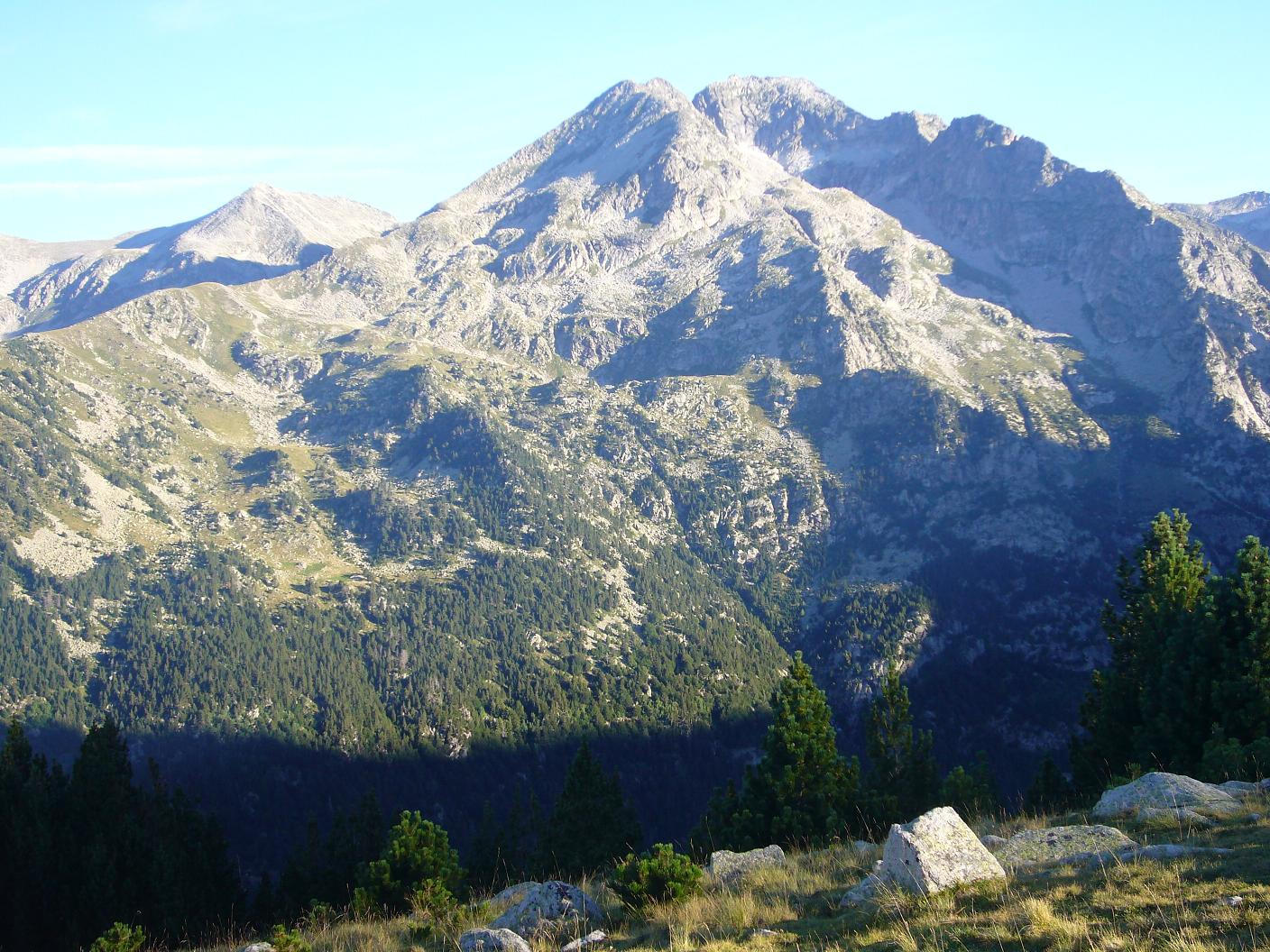 Massís de Besiberri vist des de lo Campo; la Vall de Boí, Alta Ribagorça, Catalunya